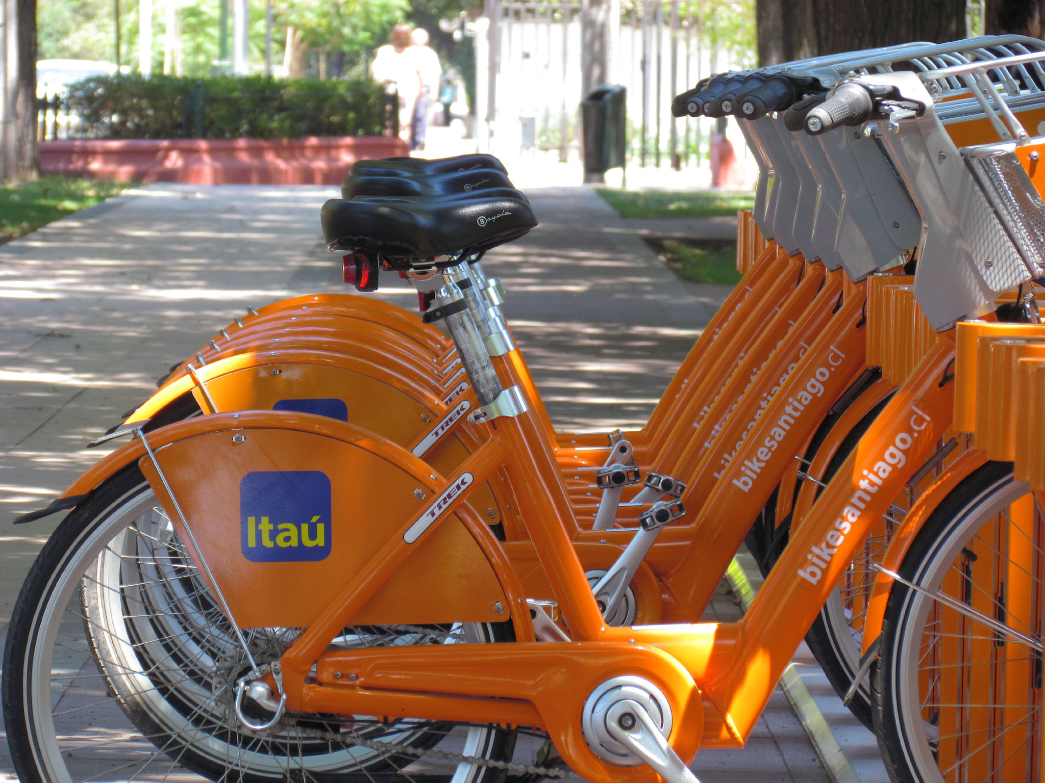 bikesantiago.cl